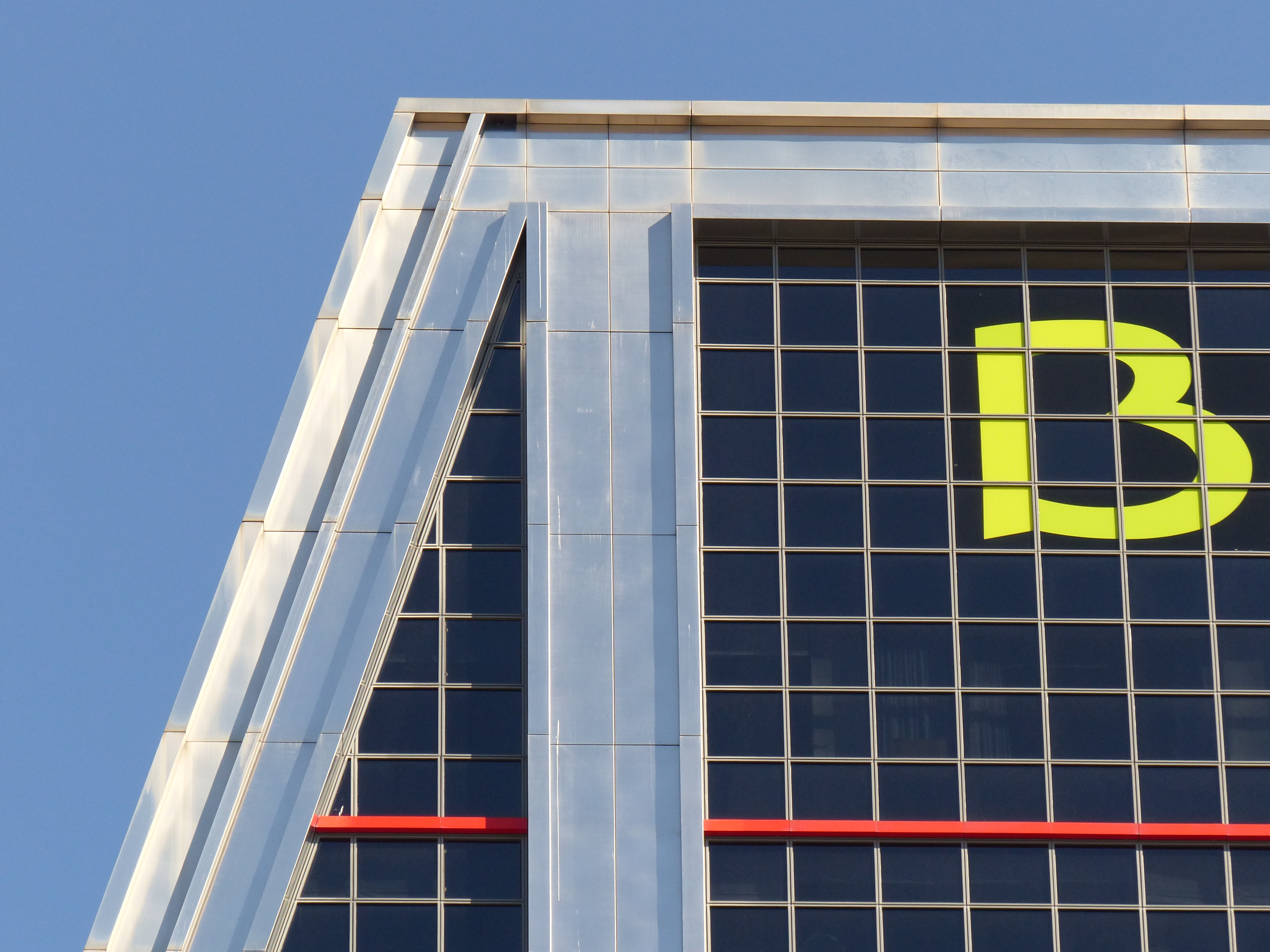 Torres Kio, Bankia.